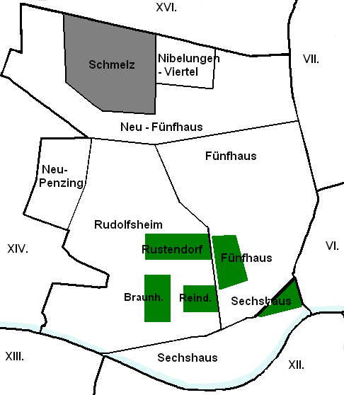 Karte der Schmelz